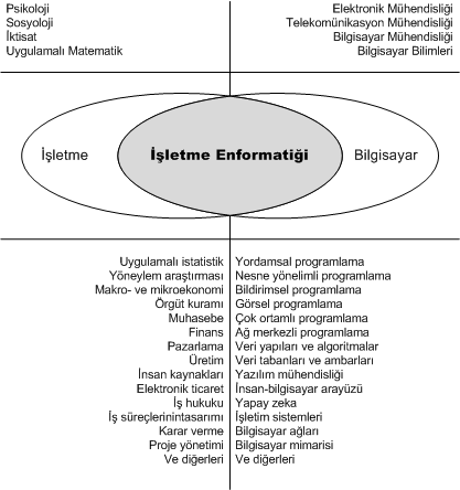 İşletme enformatiği disiplininin kapsamı.